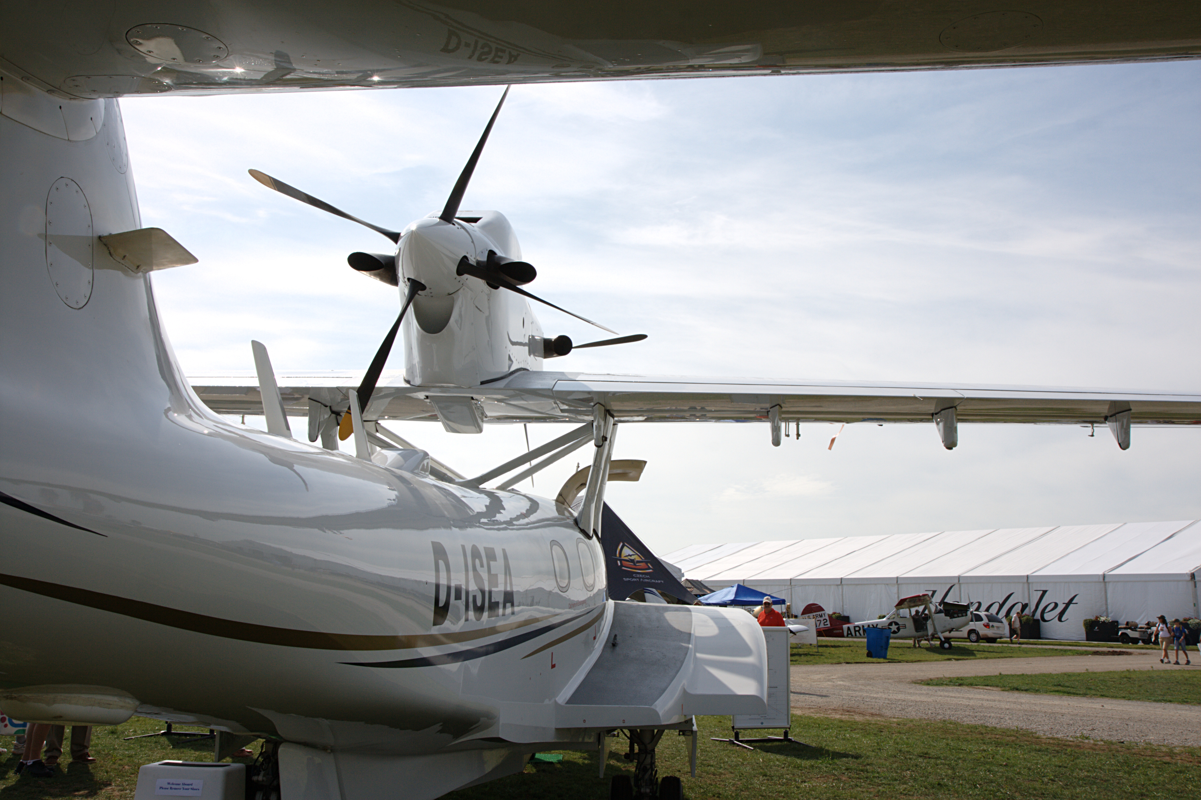 Dornier Seastar